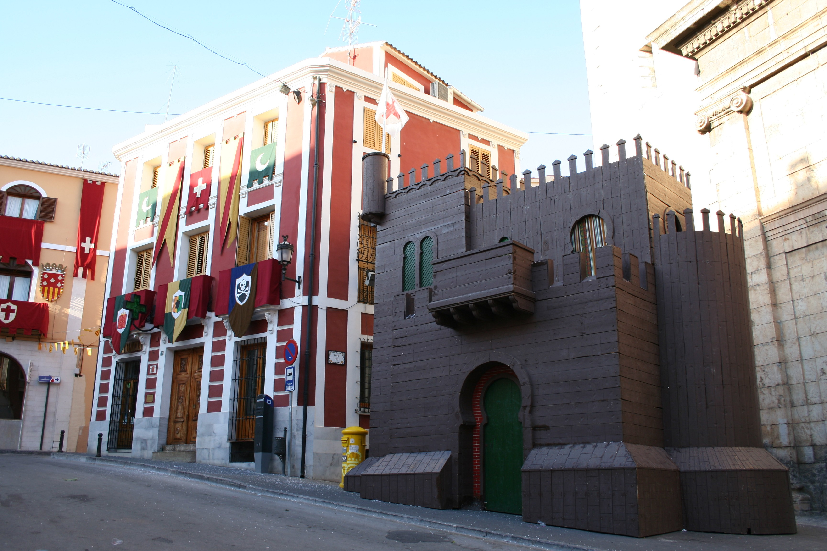 Castillo de la fiesta de Moros y Cristianos en la plaza del ayuntamiento